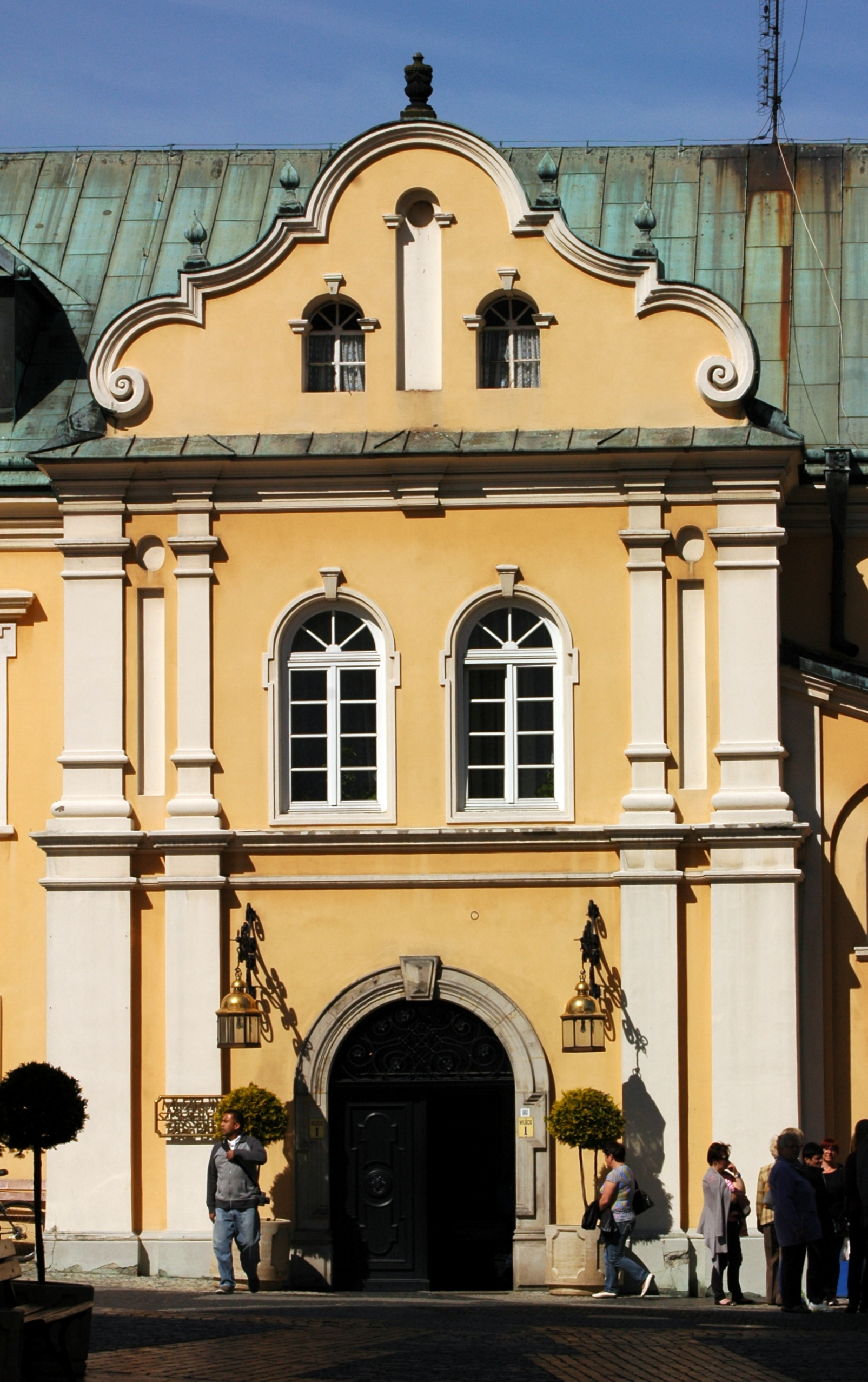 Częstochowa: Jasna Góra